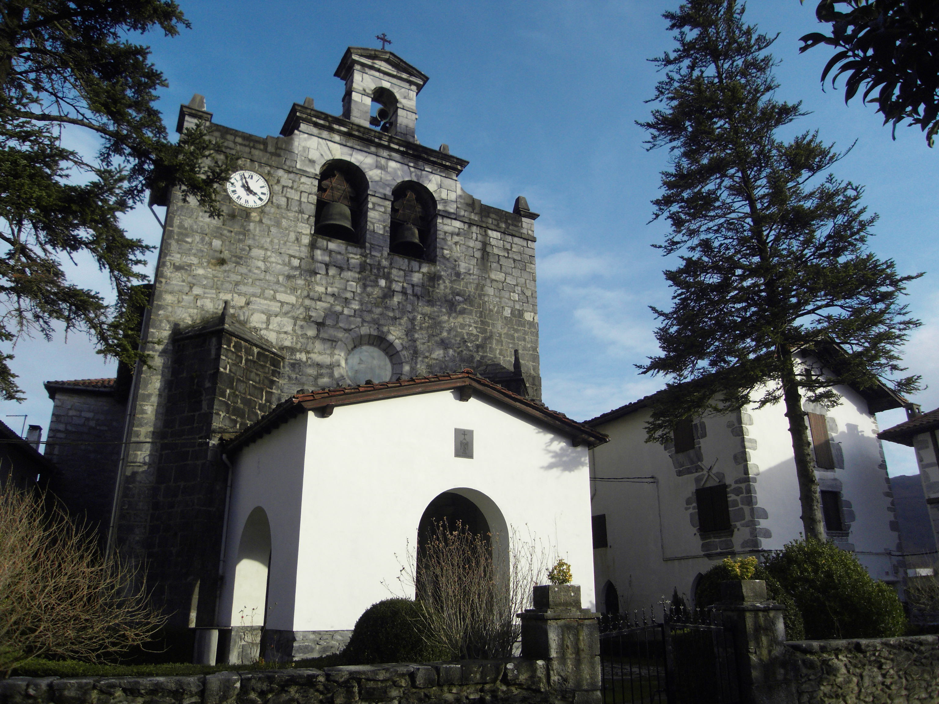 San Migel Goiaingeruaren (edo Arkanjeluaren) elizaren sarrera eta dorrea, Igantzi (Nafarroa)